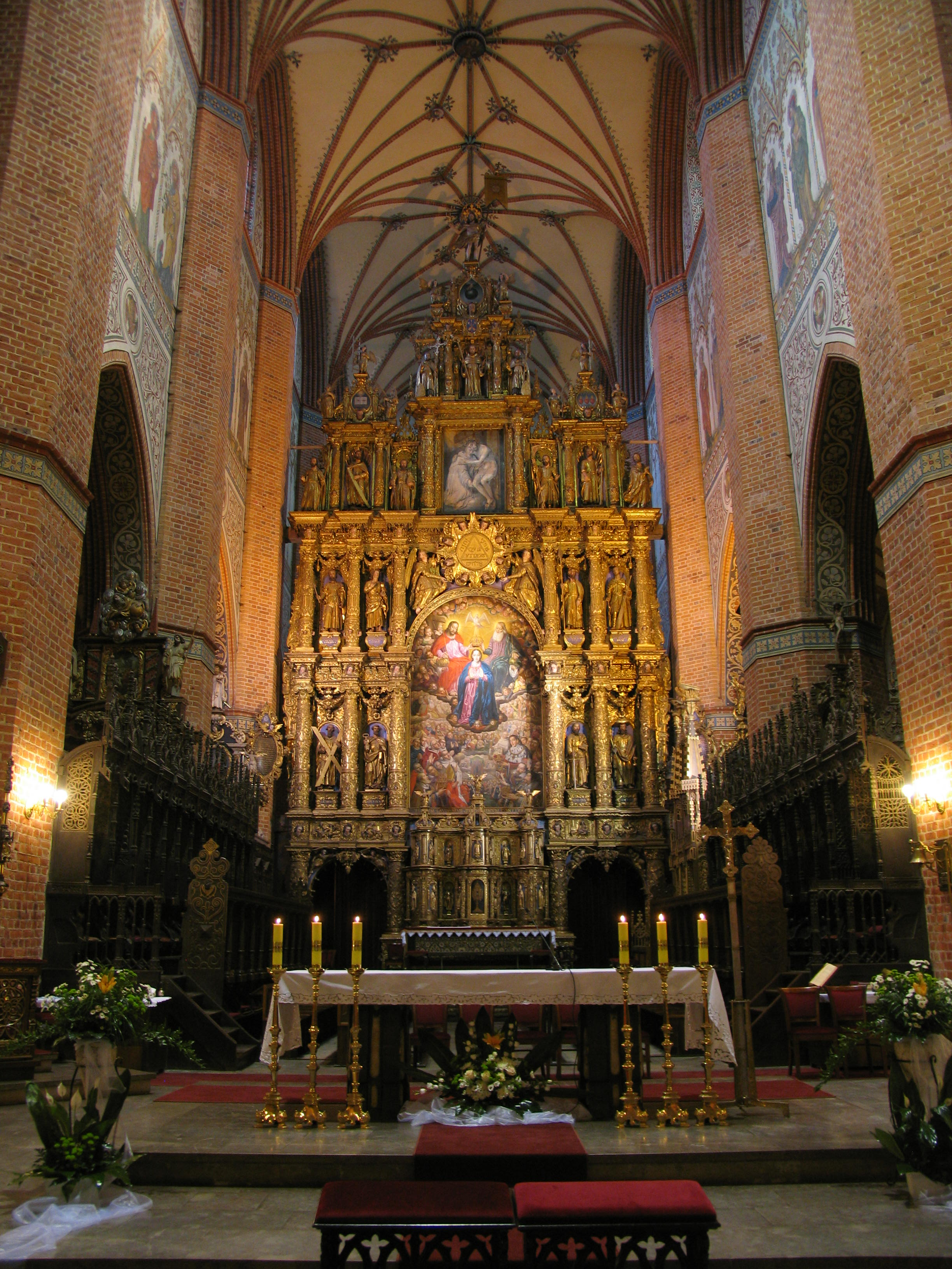 Pelplin, kościół, ob. katedra p.w. NMP, 1280-1350, 1557, 1894-1899